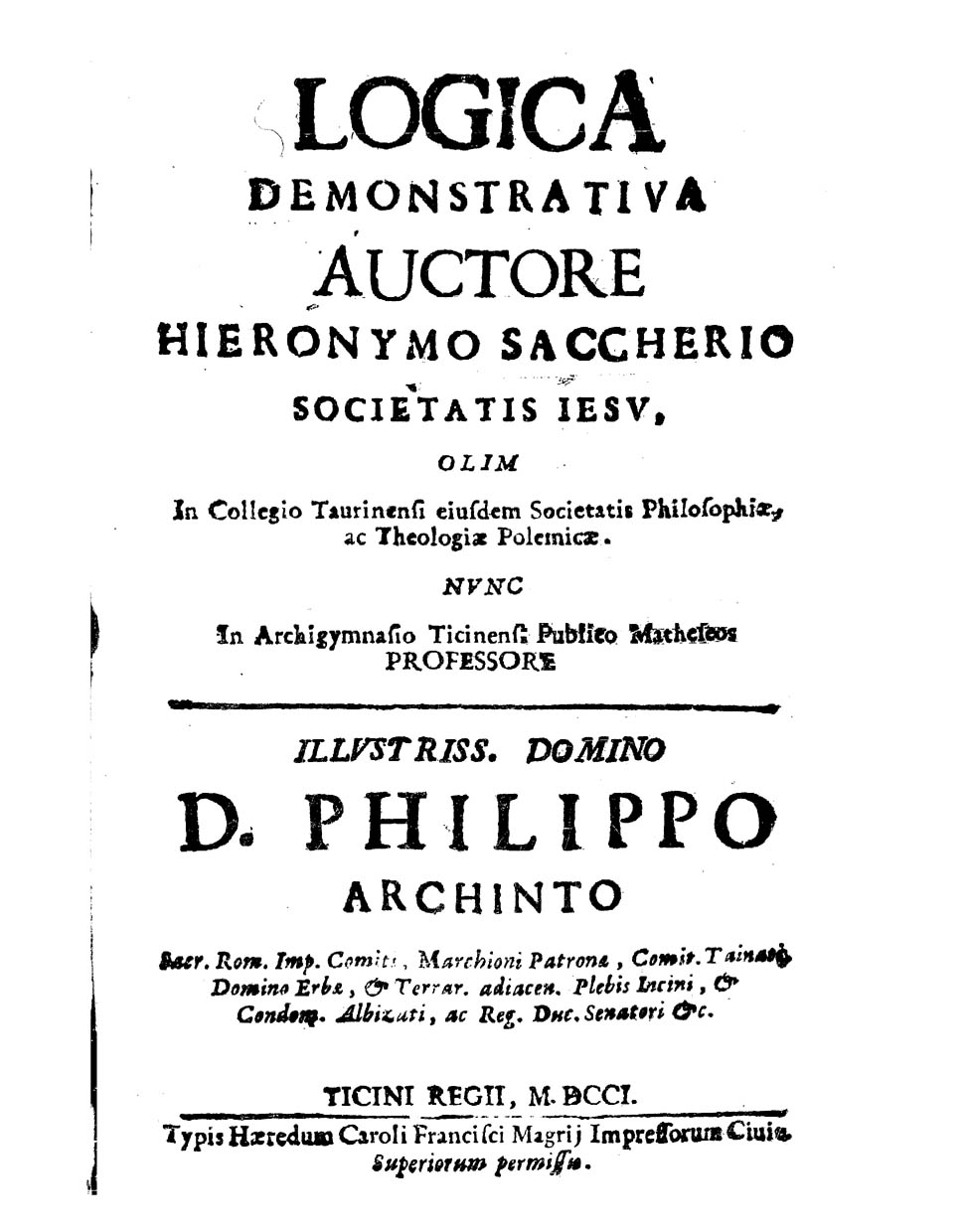 Logica demonstratiua auctore Hieronymo Saccherio Societatis Iesu .... - Ticini Regij : typis haeredum Caroli Francisci Magrij impressorum ciuit., 1701. - [8], 167, [1] p. ; 8º .